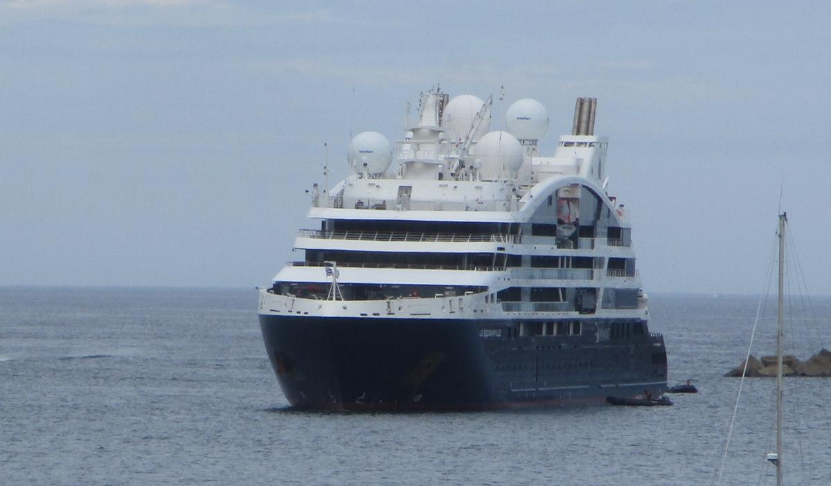 Le Bougainville, navire de croisière de la compagnie du Ponant, dans la passe de la rade de Saint Jean-de-Luz